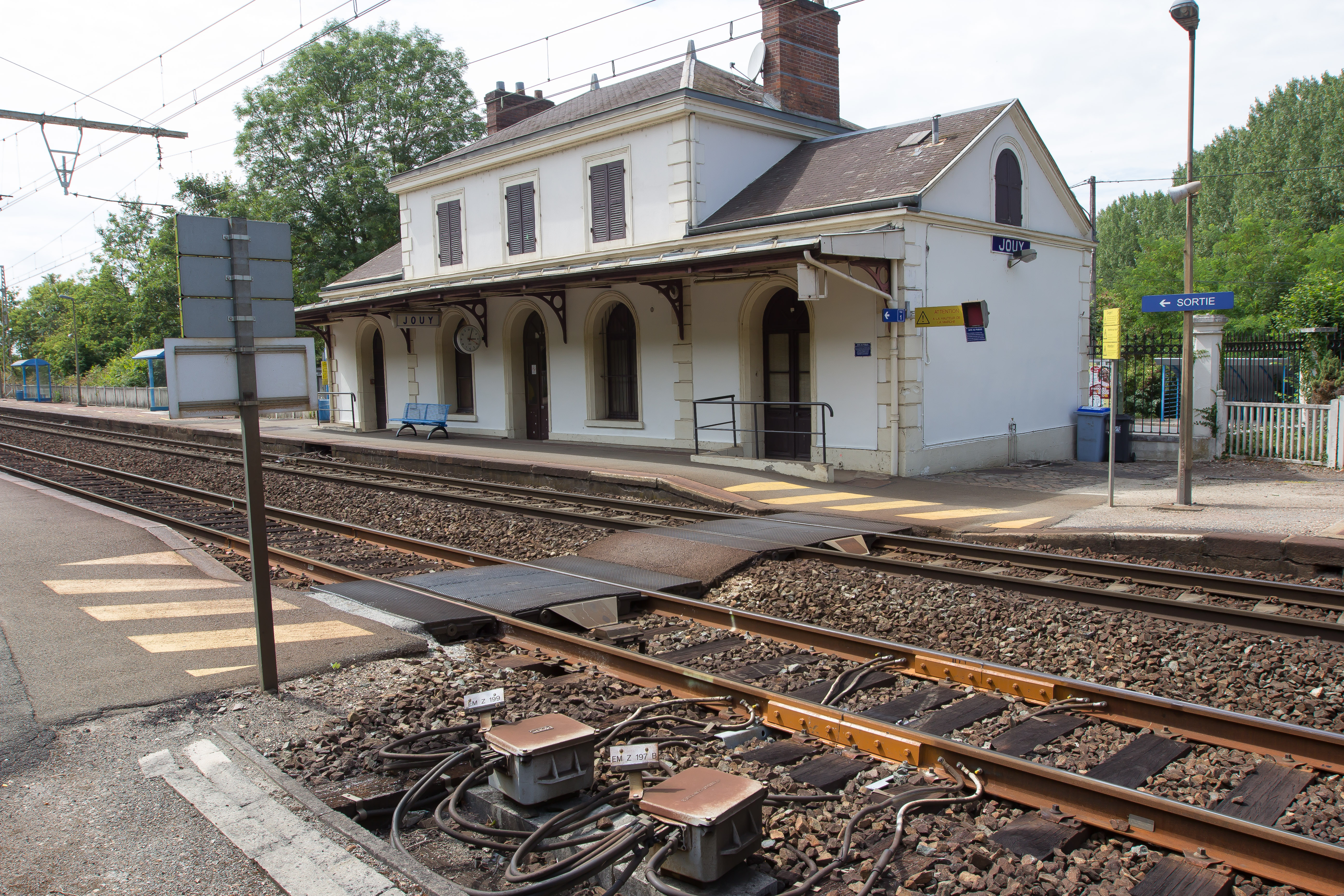 Le bâtiment voyageurs de la gare de Jouy vu depuis les quais (Jouy / Eure-et-Loir / France)